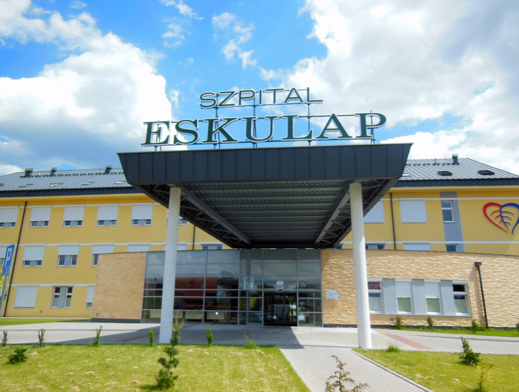 Osielsko k. Bydgoszczy, szpital prywatny Eskulap